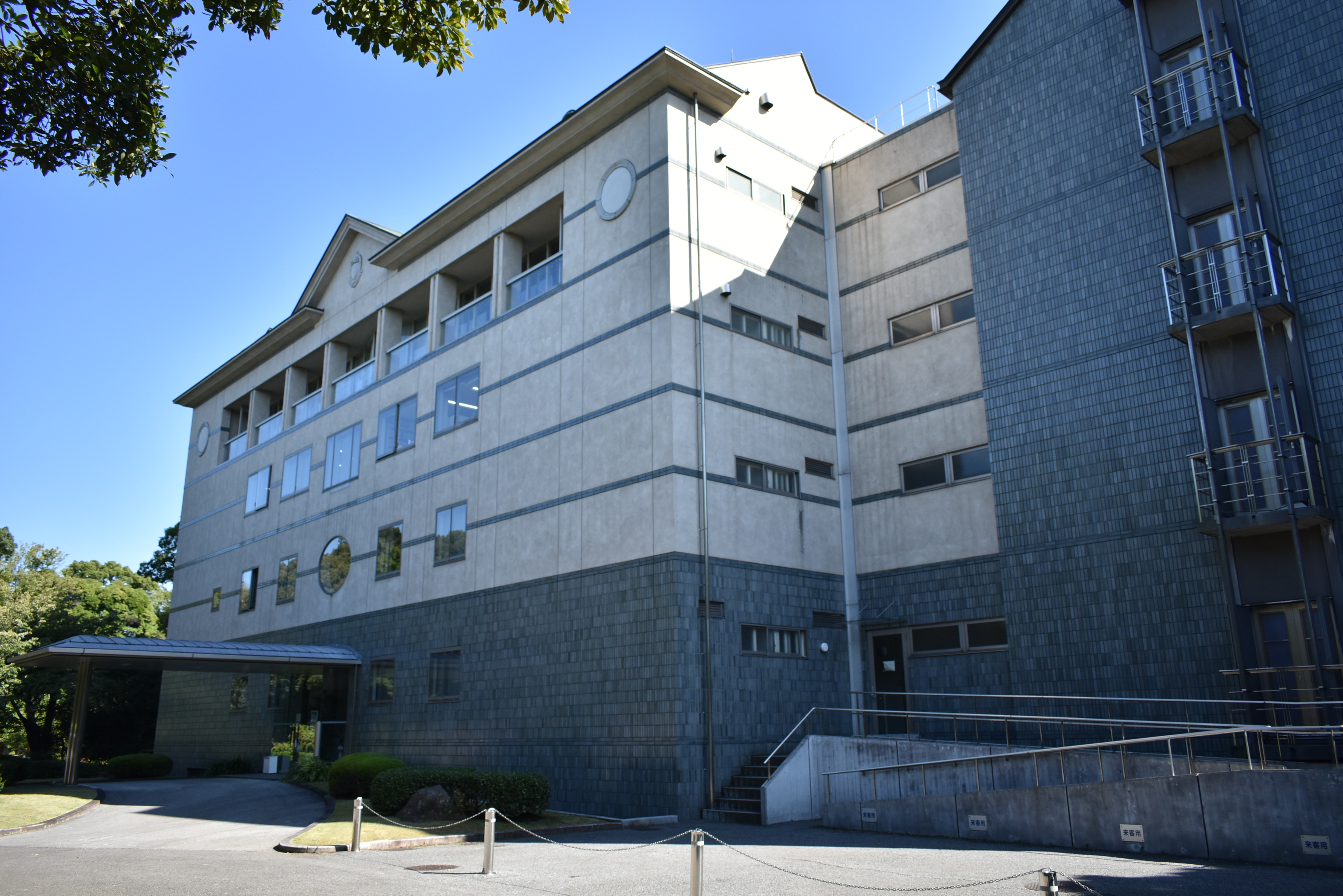 皇居東御苑 書陵部